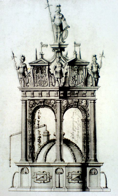 Der Goldene Brunnen auf dem Marktplatz von Leipzig; lavierte Federzeichnung